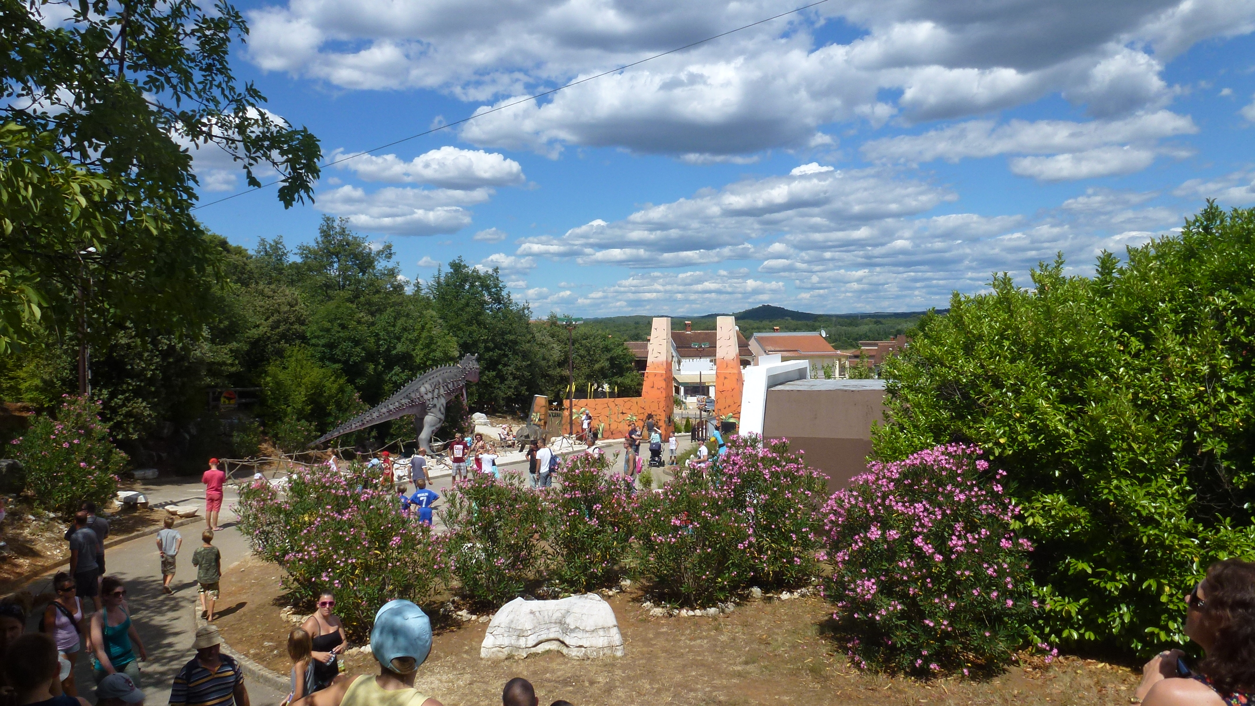 Dinopark, Funtana, Croatia (dinopark.hr)